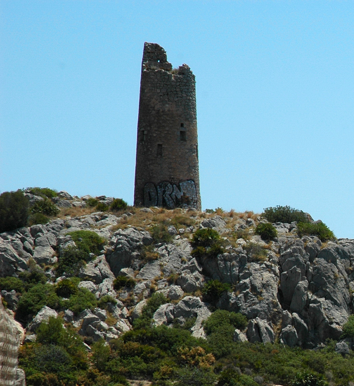 Costa de Oropesa y Benicasim This is a photography of a Special Area of Conservation in Spain with the ID: ES5223037. Natura2000 entry, EEA entry